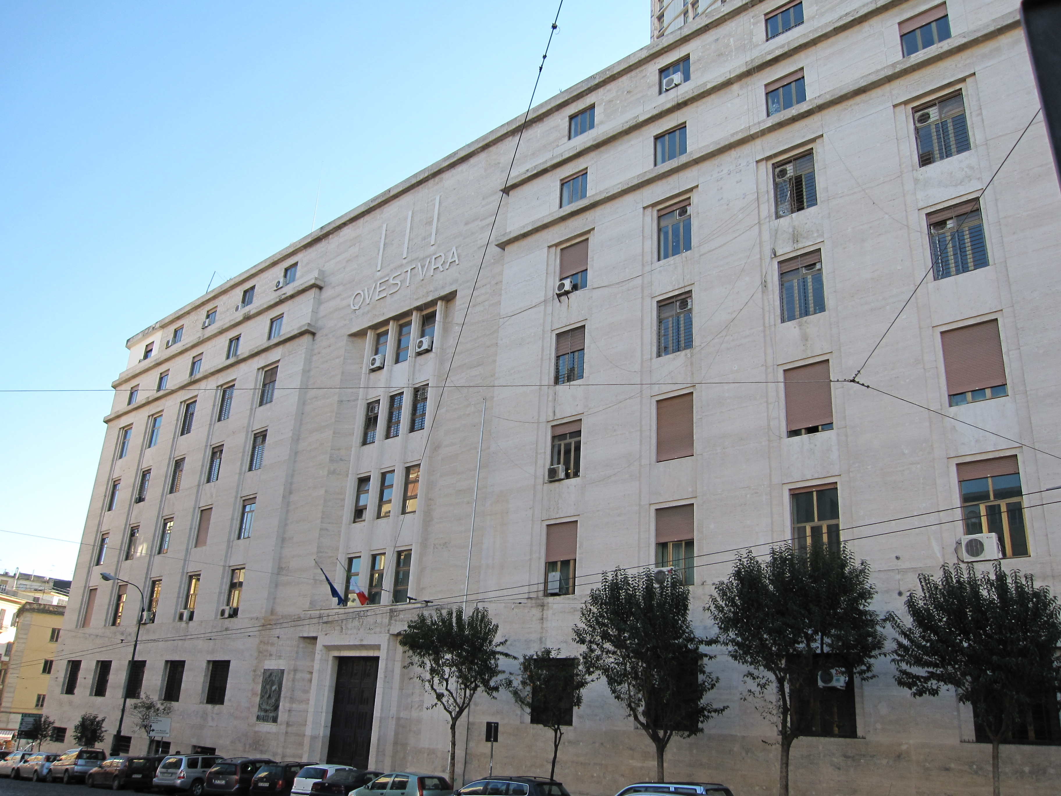 Piazza Matteotti, Napoli. Ufficio Tecnico Alto Commissariato - Regia Questura (Via Diaz) Realizzato tra il 1935 e il 1937.